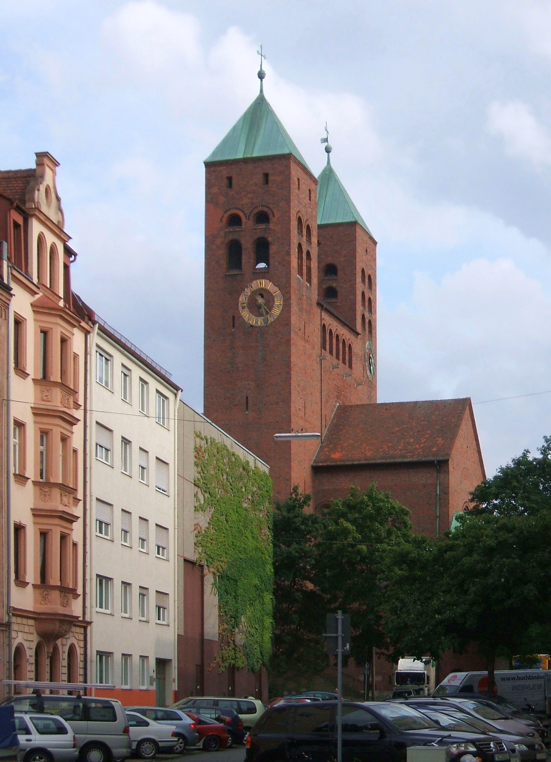 Gustav-Adolf-Gedächtniskirche Nürnberg, von der Wirthstraße aus gesehen.